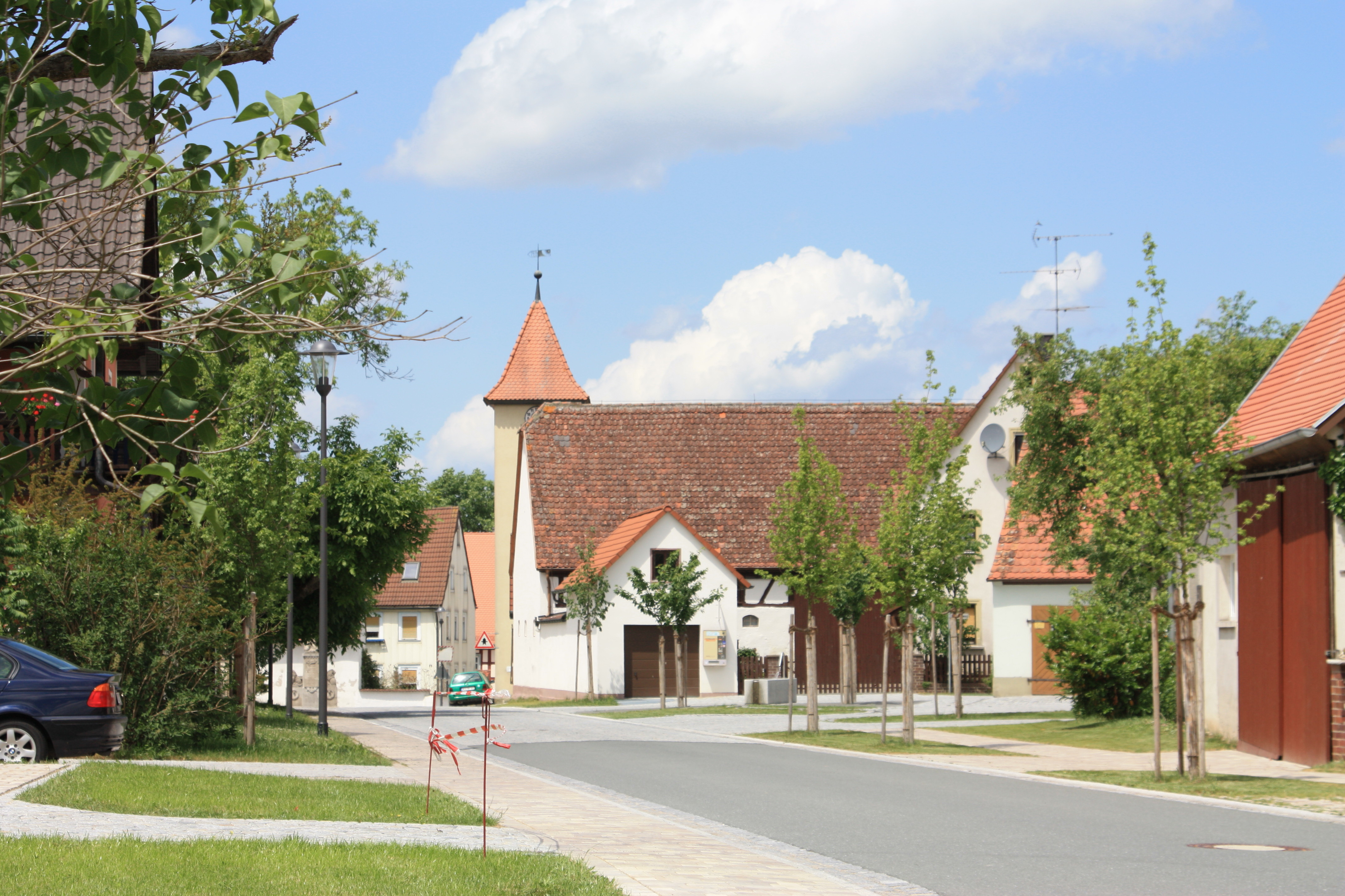 Ortsmitte von Südosten